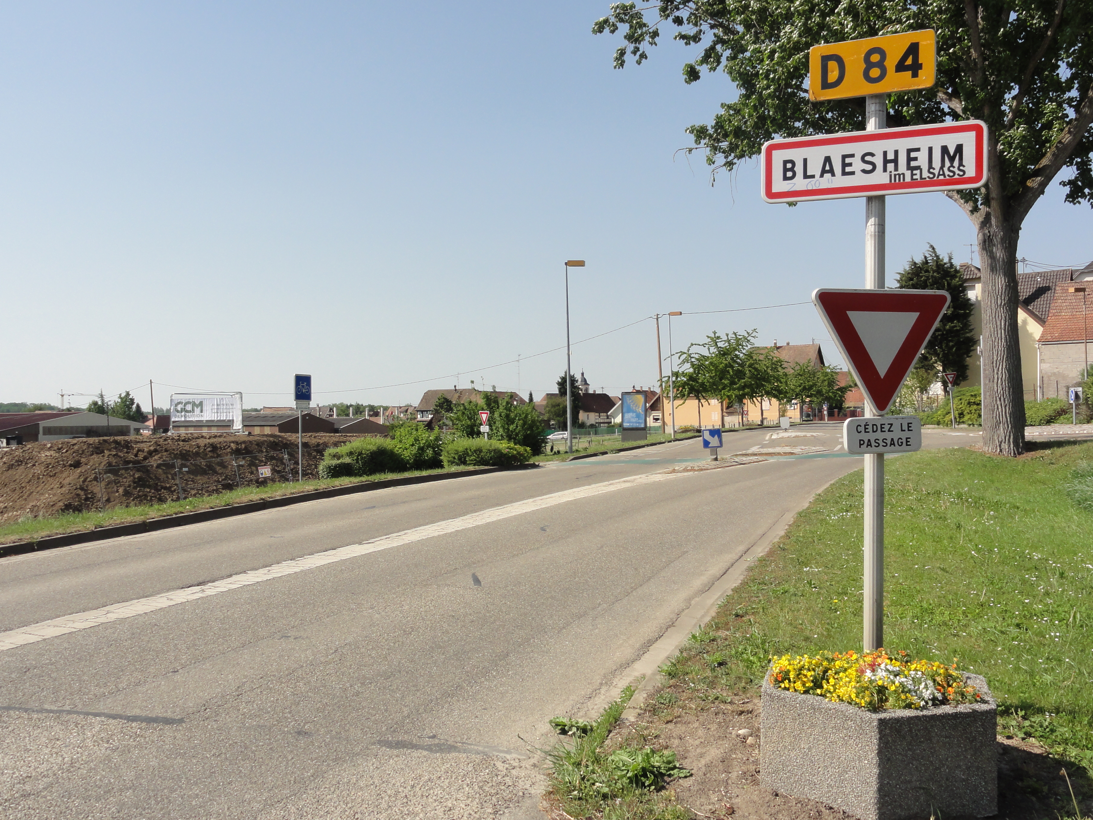 Blaesheim (Bas-Rhin) city limit sign